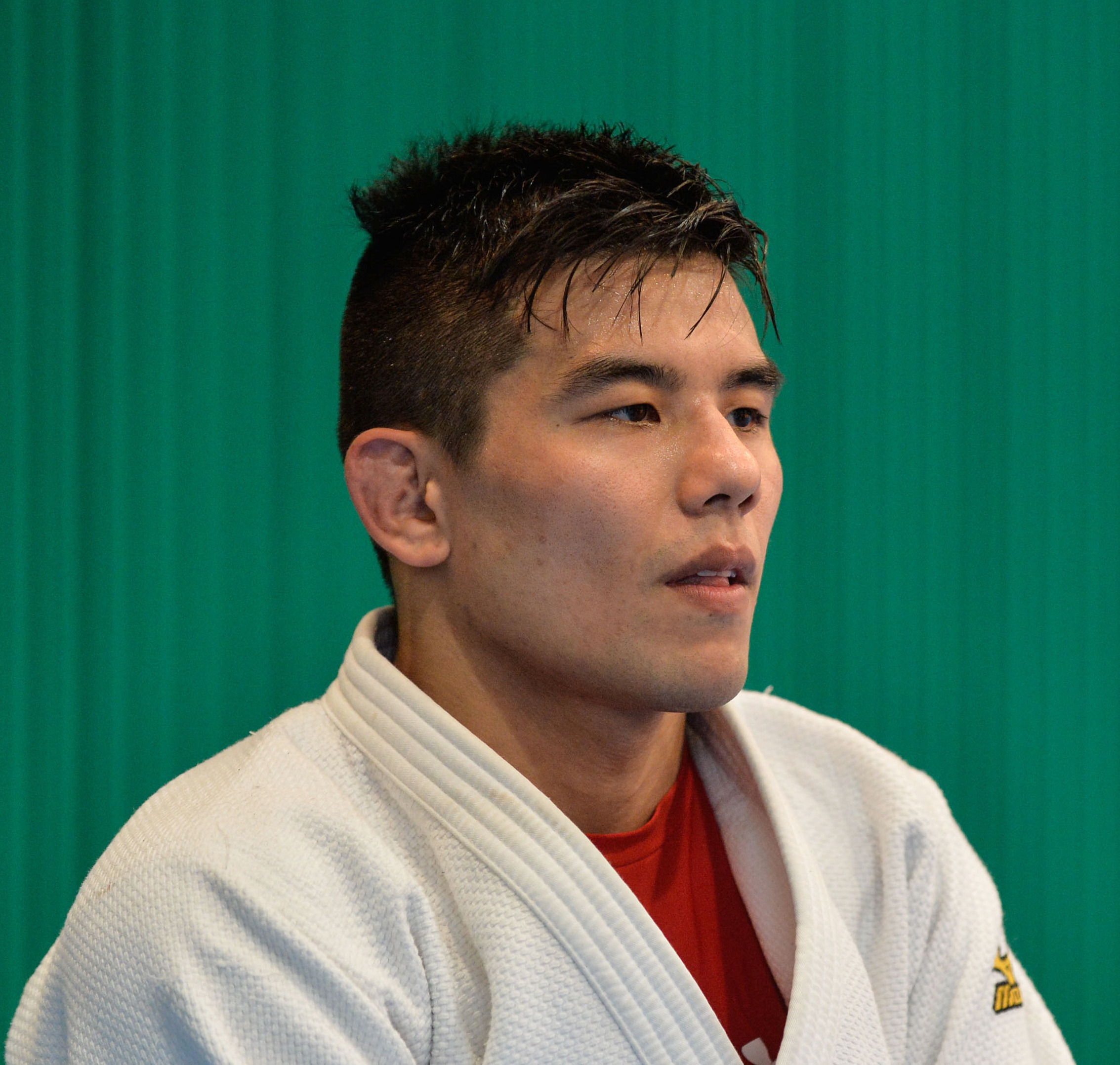 Treinamento da Equipe Brasileira de Judô em Mungyeong. Foto: Felipe Barra